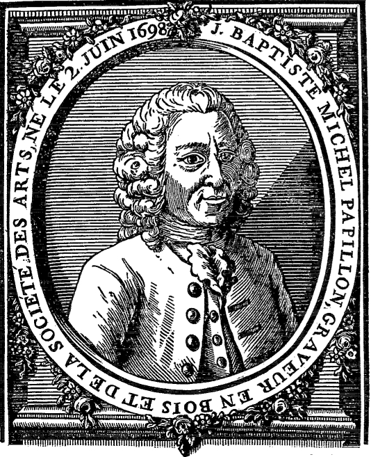 Portrait du graveur français Jean-Michel Papillon (1698-1776). Gravure d'après un autoportrait (avec la mention erronée Jean-Baptiste Michel Papillon) L'original se trouve comme frontispice dans le Traité historique et pratique de la gravure en bois (Paris, 1766) du même, gravé par Nicolas Caron.